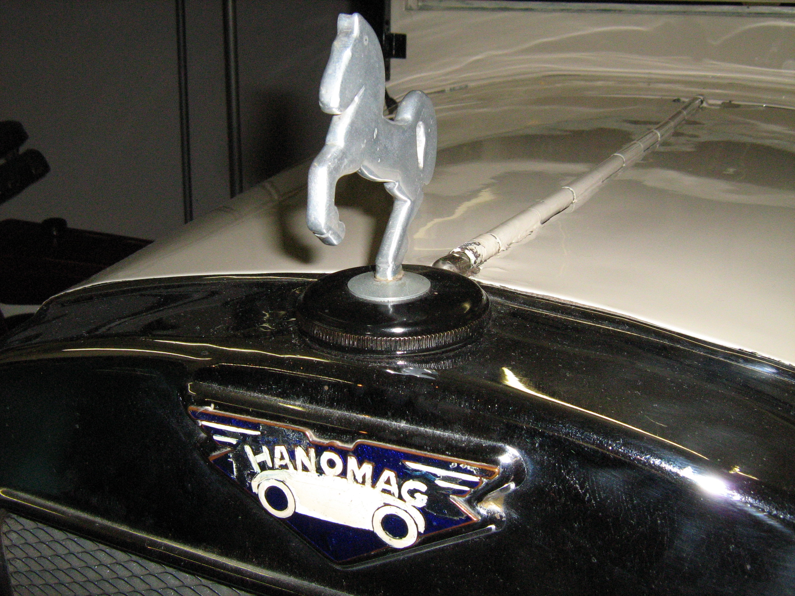 Hanomag Emblem